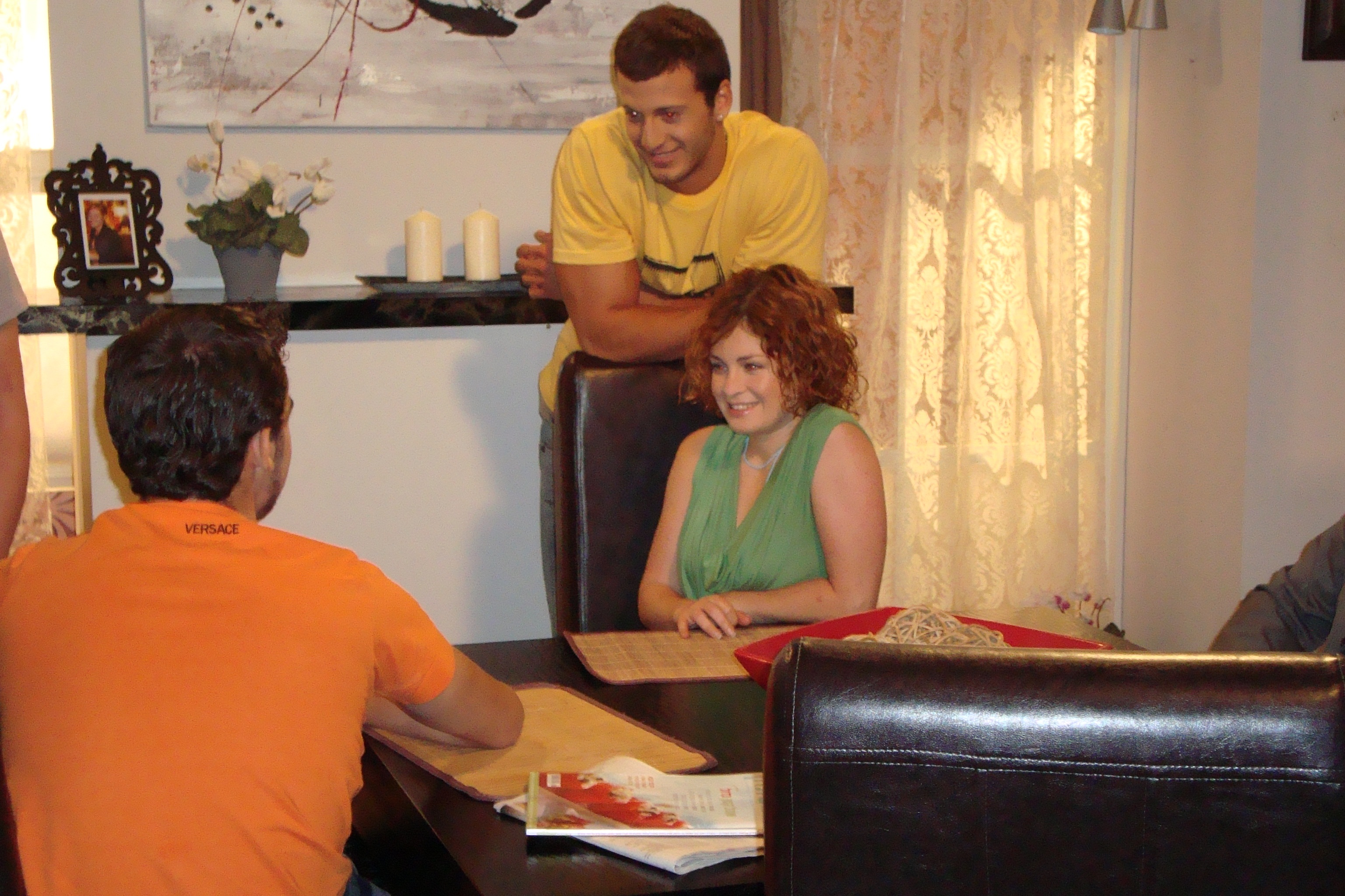 שרון ענבר ביחד עם מייקל לואיס ורועי ויינברג בזמן צילומי סצנה